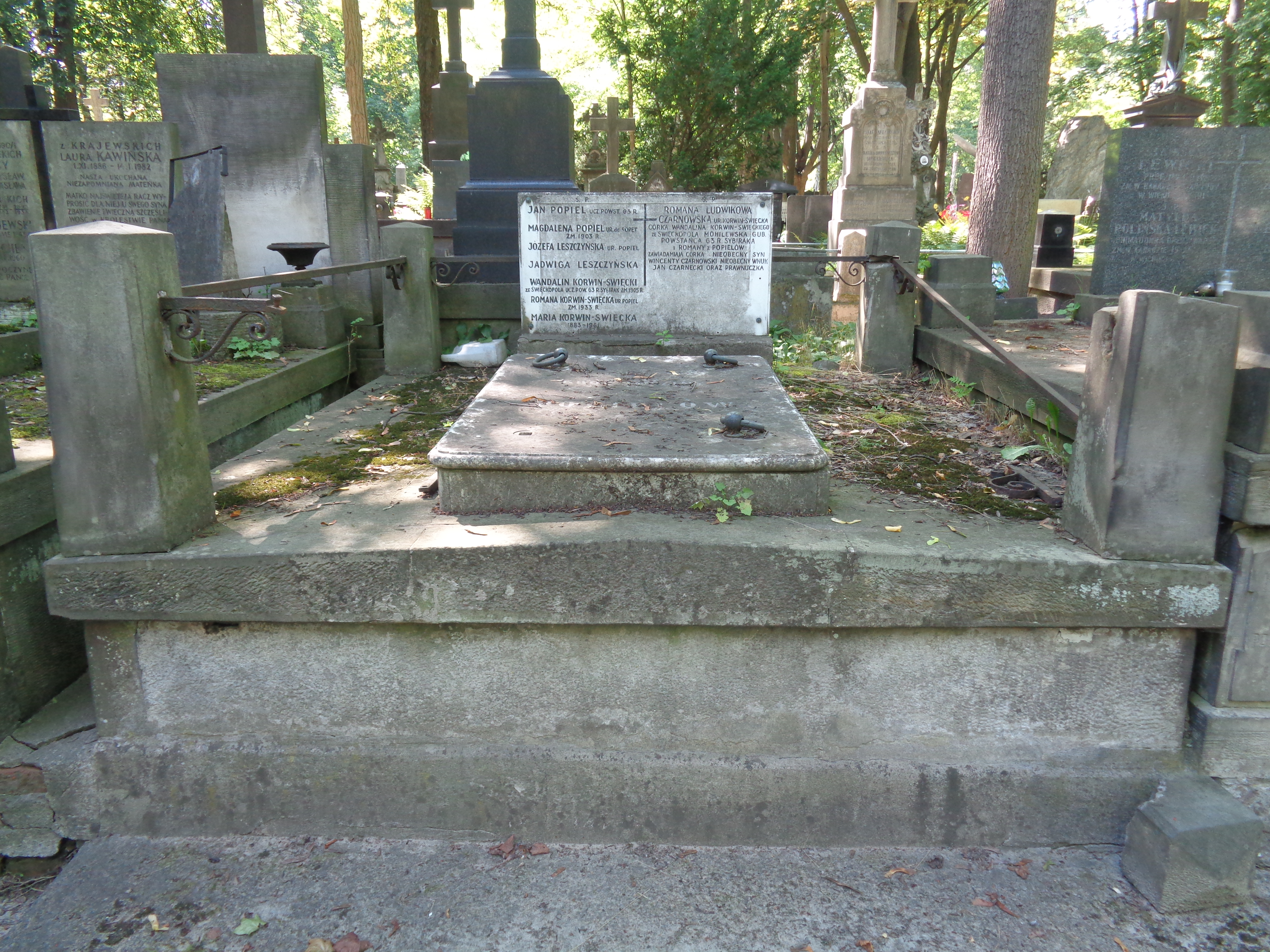 Grób aktorki Romany Popiel na Cmentarzu Powązkowskim